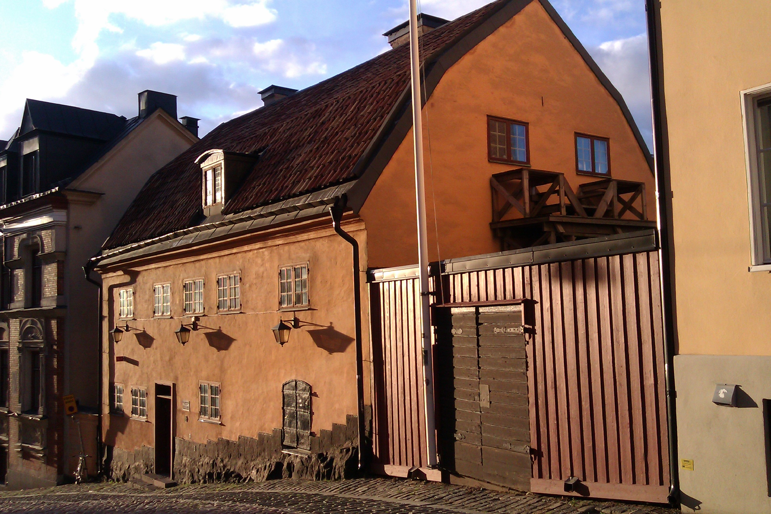 Huset där Carl Michael Bellman bodde åren 1770-1774.